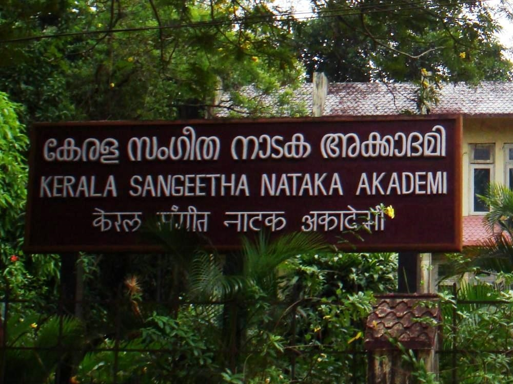 Kerala Sangeetha Nadaka Academy, Thrissur